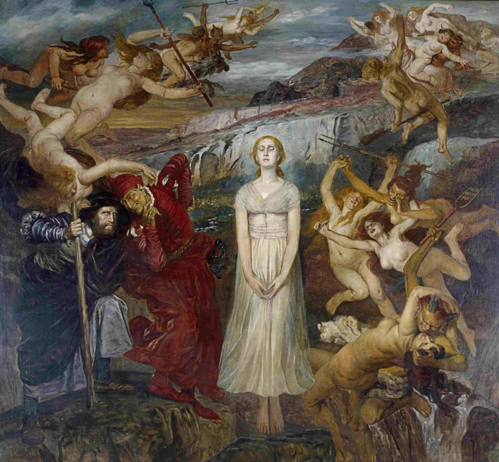 Walpurgisnachtsszene aus "Faust", Öl auf Leinwand, 186 x 206 cm; Museum Abtei Liesborn des Kreises Warendorf